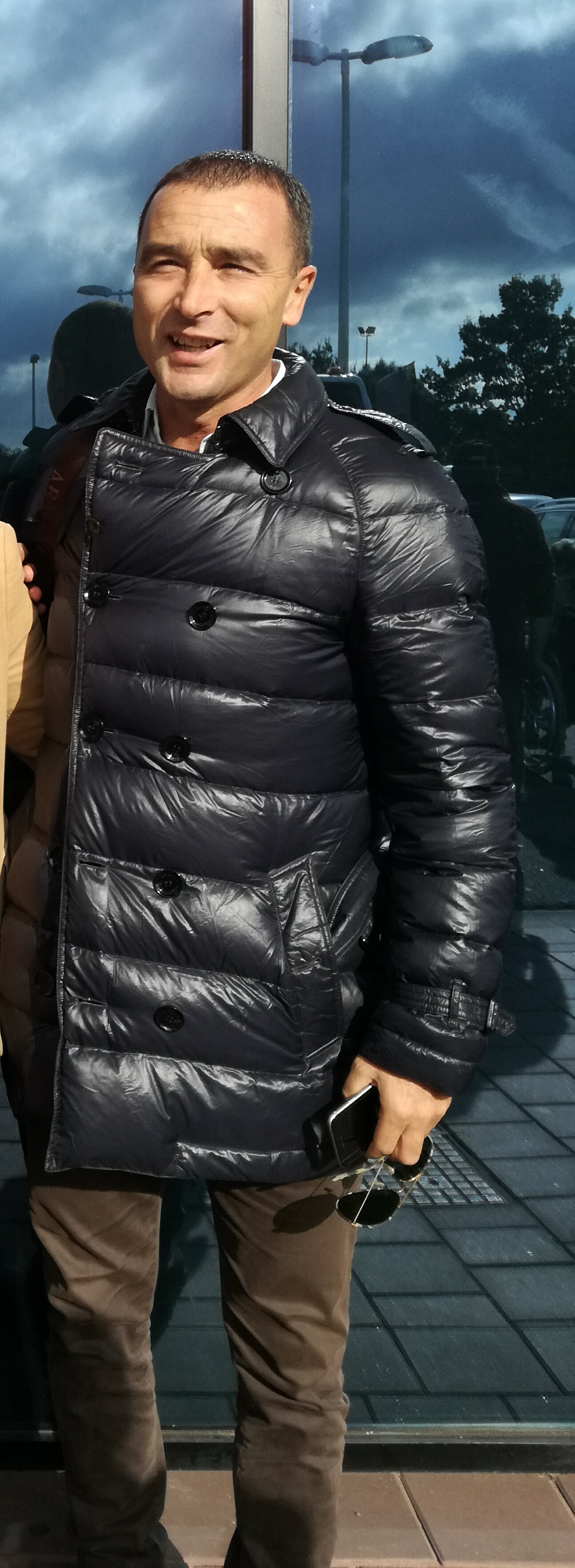 Darko Anic